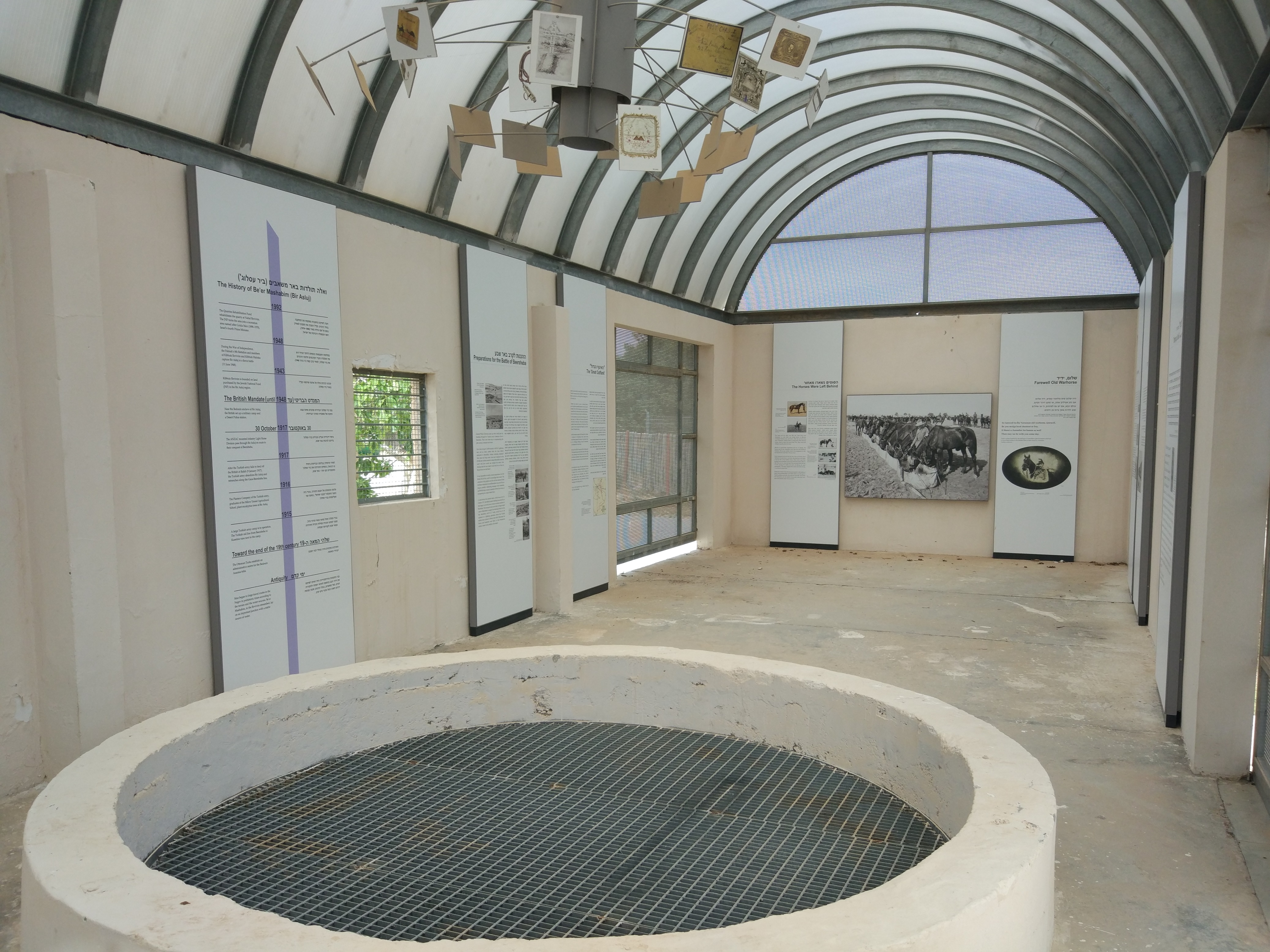 מבט מתוך באר אנז"ק בפארק גולדה. במקום תצוגה המוקדשת לפרשים הקלים האוסטרליים.